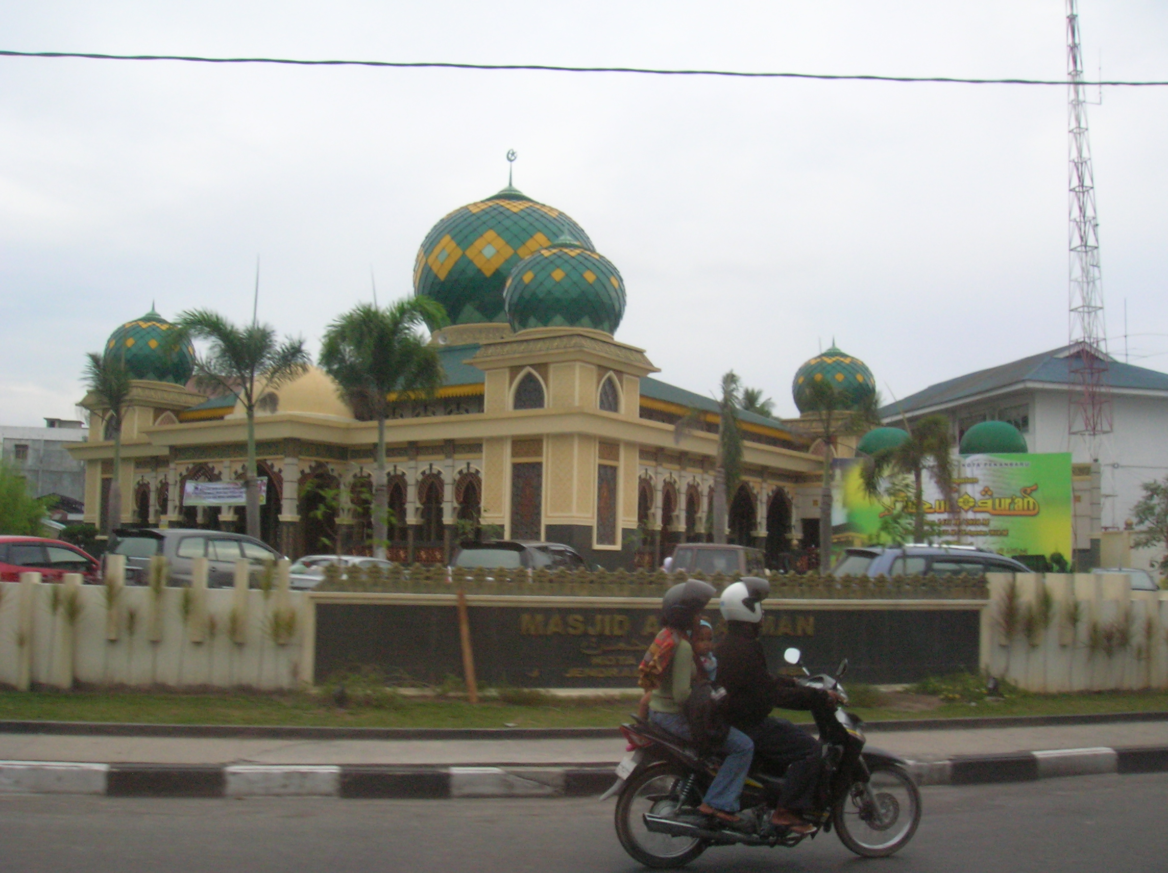 Mesjid Ar-Rahman di Pekanbaru